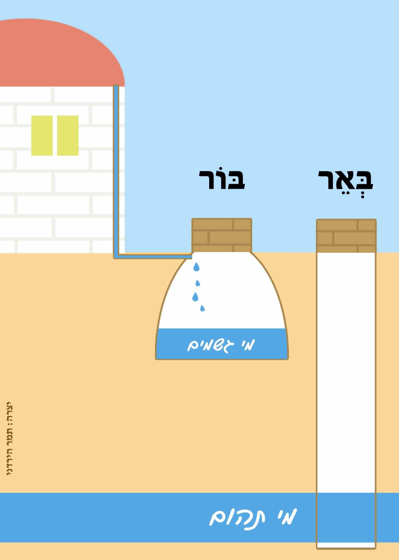 ההבדל בין בור לבאר